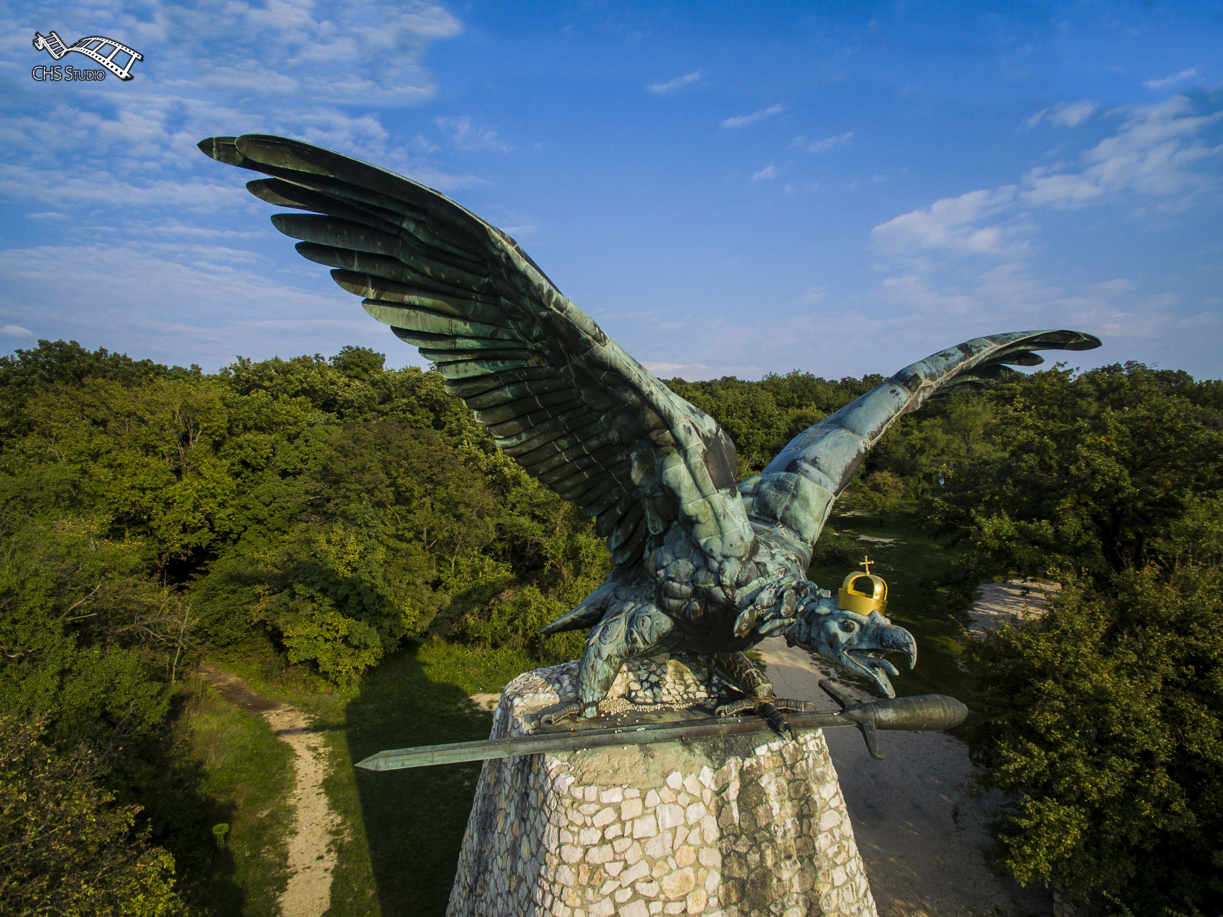 A Turulmadár egy egyedi perspektívából szemlélve. A kép egy derűs kora-őszi napon készült 2017 szeptemberében.